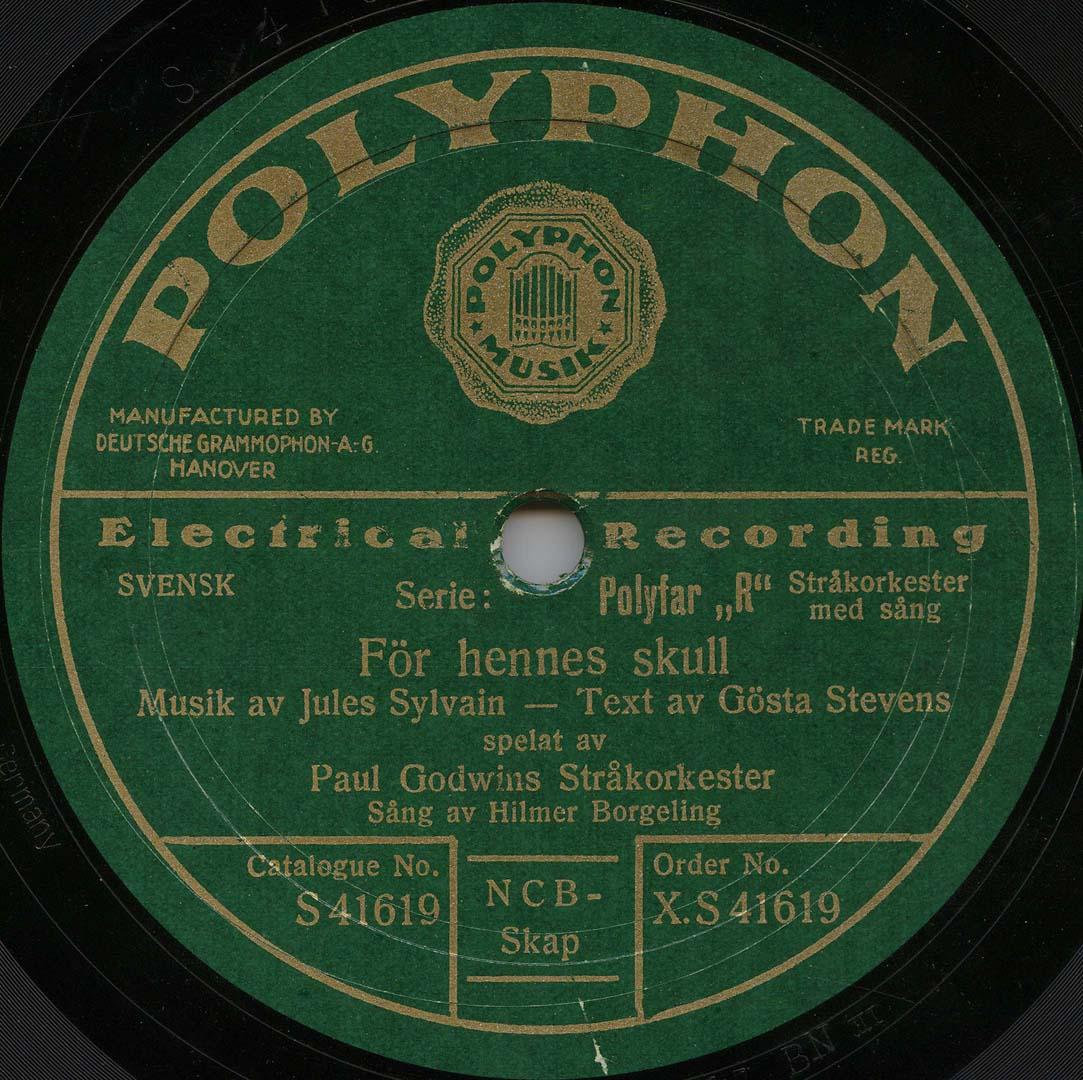 Etikett från det svensk-tyska skivmärket Polyphon, 1930.